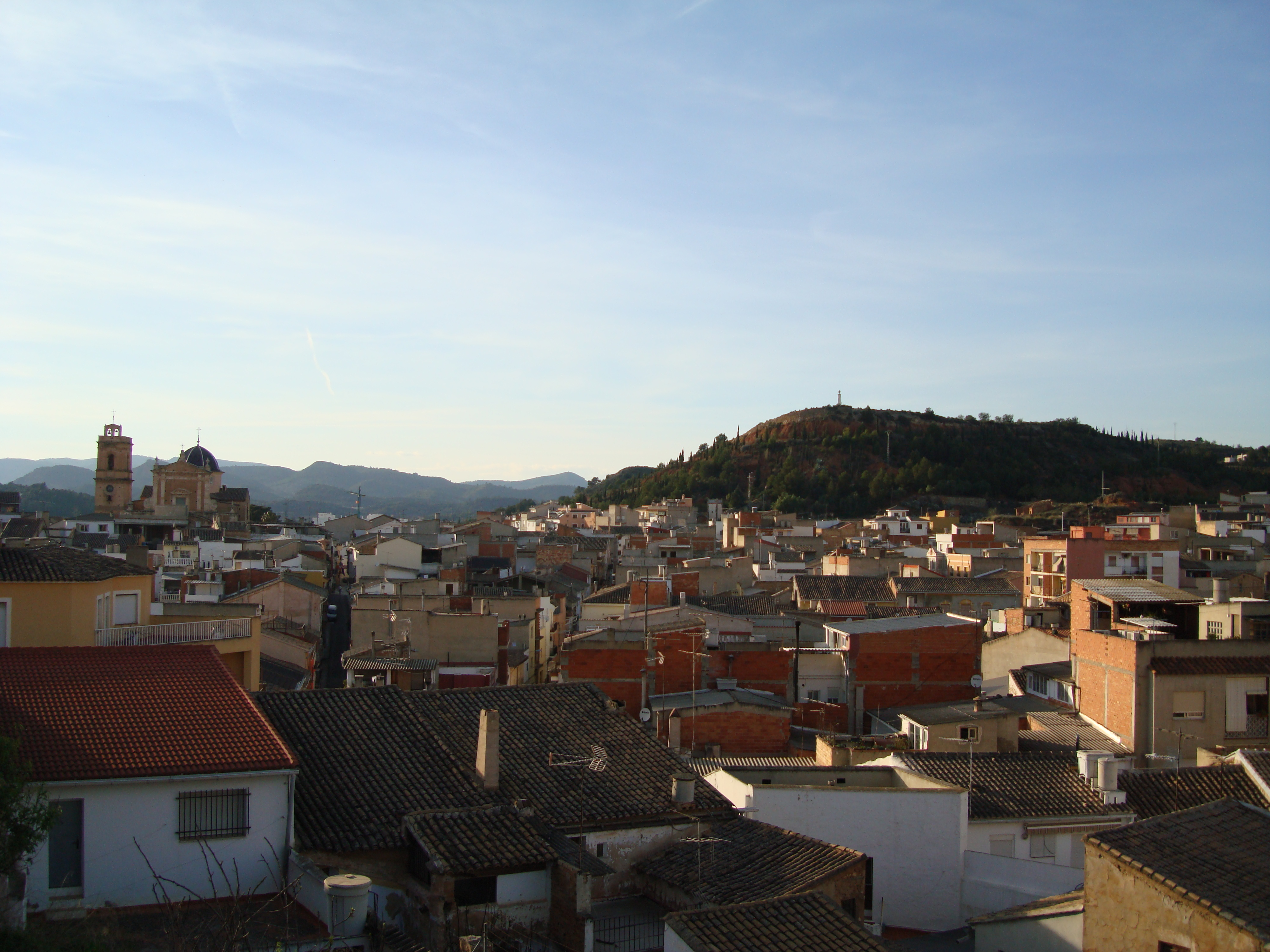 Pedralba, un pueblo